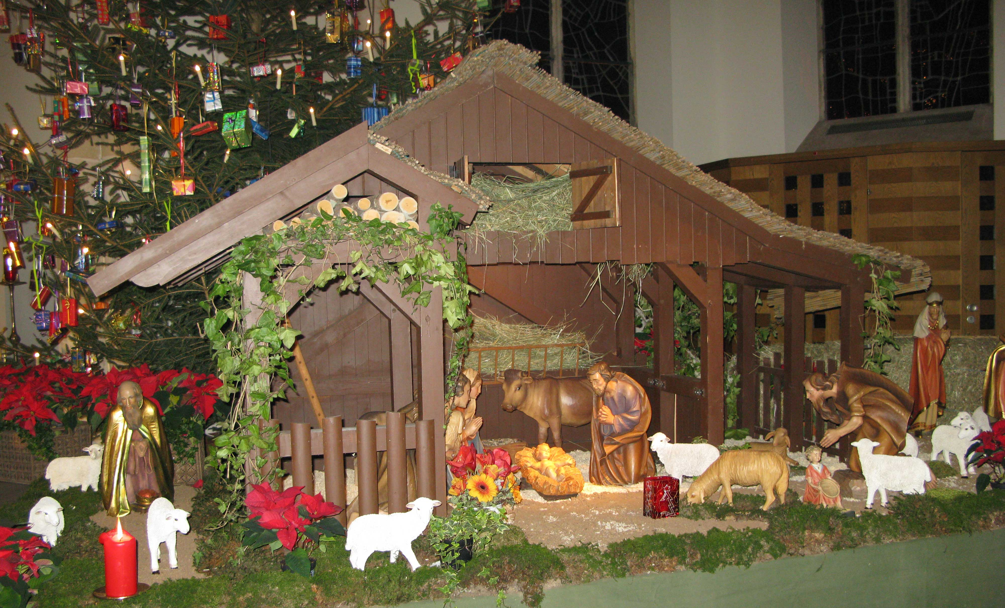 Krëppchen Habscht Kierch